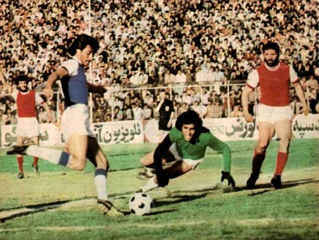 دیدار پرسپولیس تاج در ورزشگاه امجدیه در دهه پنجاه خورشیدی